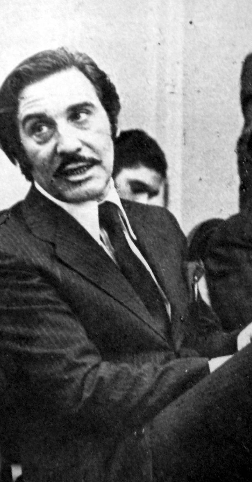 Roberto Galán